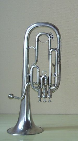 Eszkürt